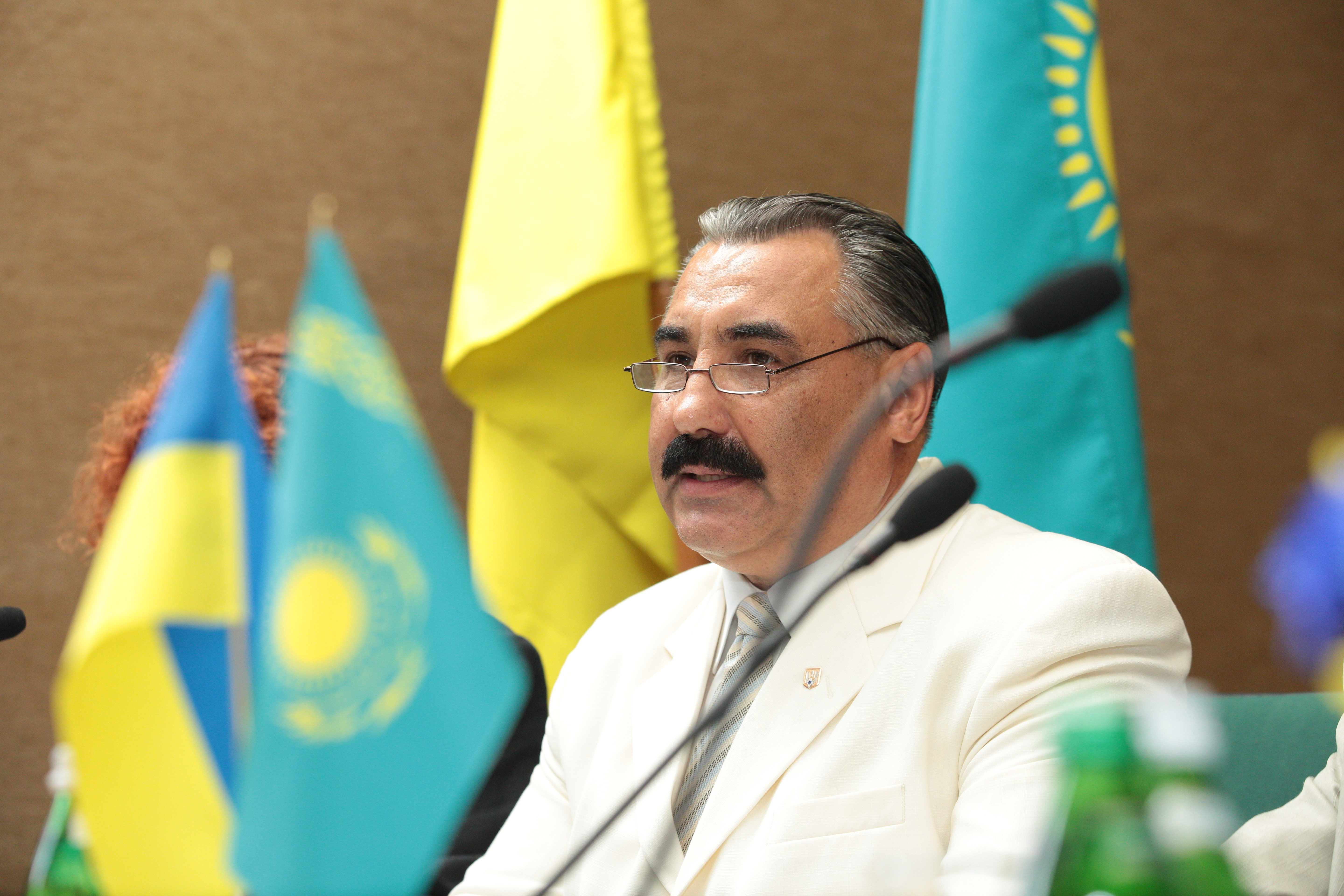 Сфотографовано на презентації книги "На основі взаємної поваги і довіри"